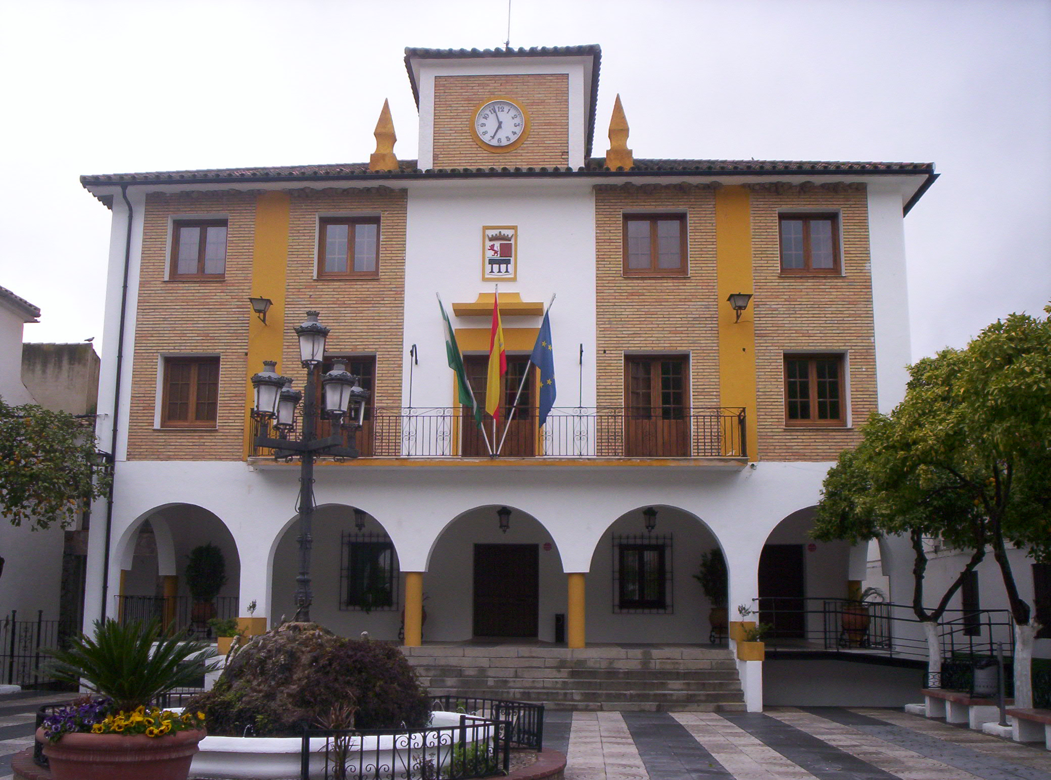 Ayuntamiento de El Bosque (Cádiz)